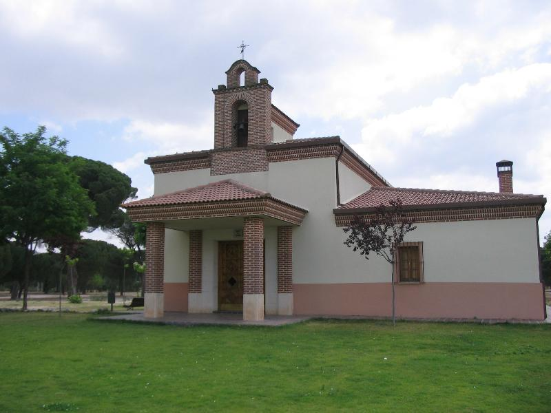 Ermita de Sacedón, situada en pinar a la orilla de un prufundo valle del rio Eresma en Pedrajas de San Esteban (Valladolid, Castilla y León).